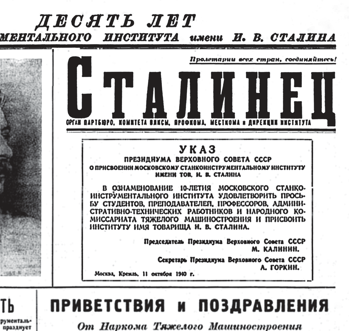 Указом Президиума Верховного Совета от 11 октября 1940 года Станкину было присвоено имя И. В. Сталина